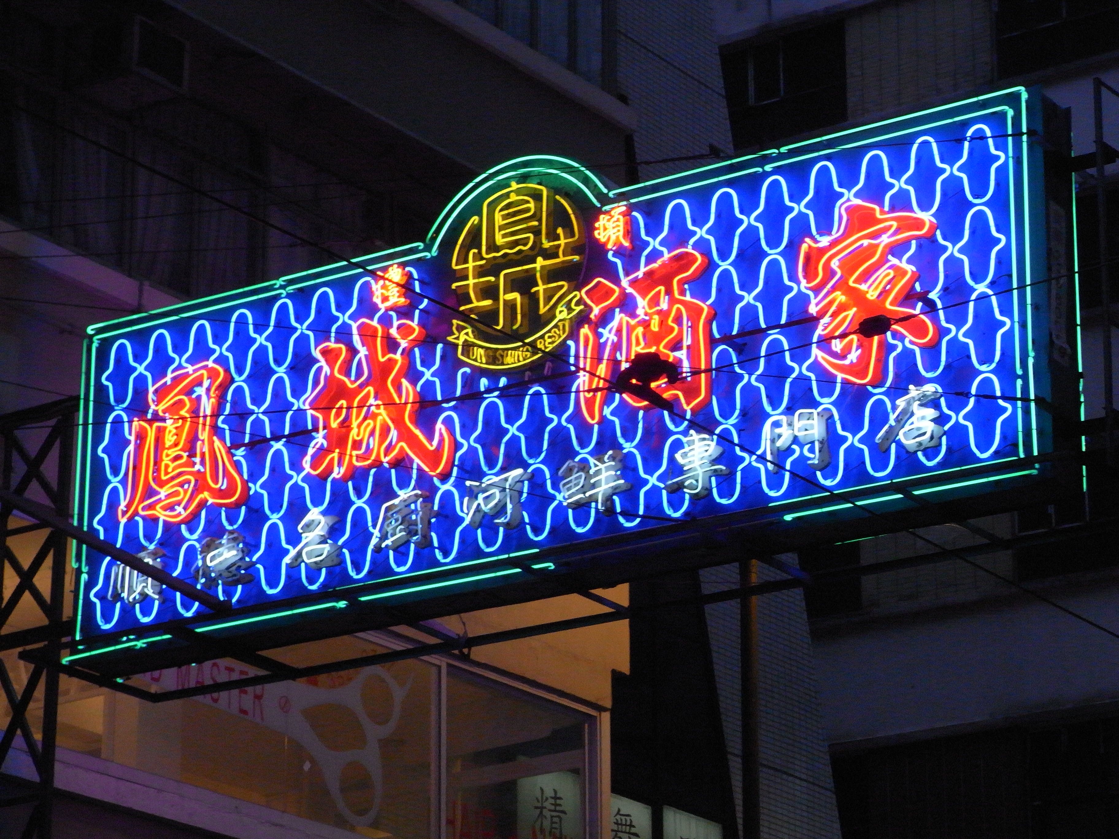 銅鑼灣禮頓道鳳城酒家